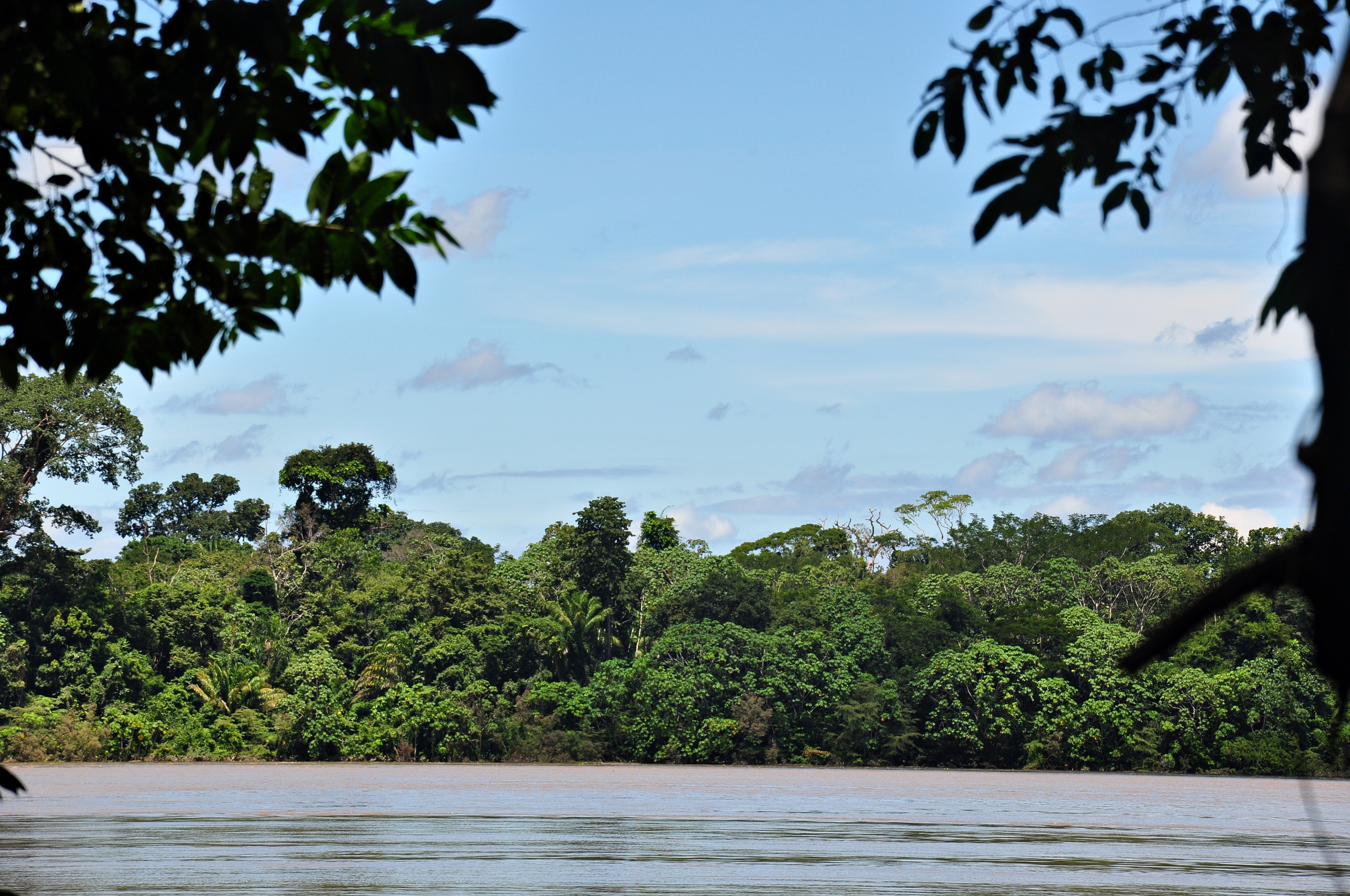 Rio Madiera vista de dentro do Parque Nacional Mapinguari